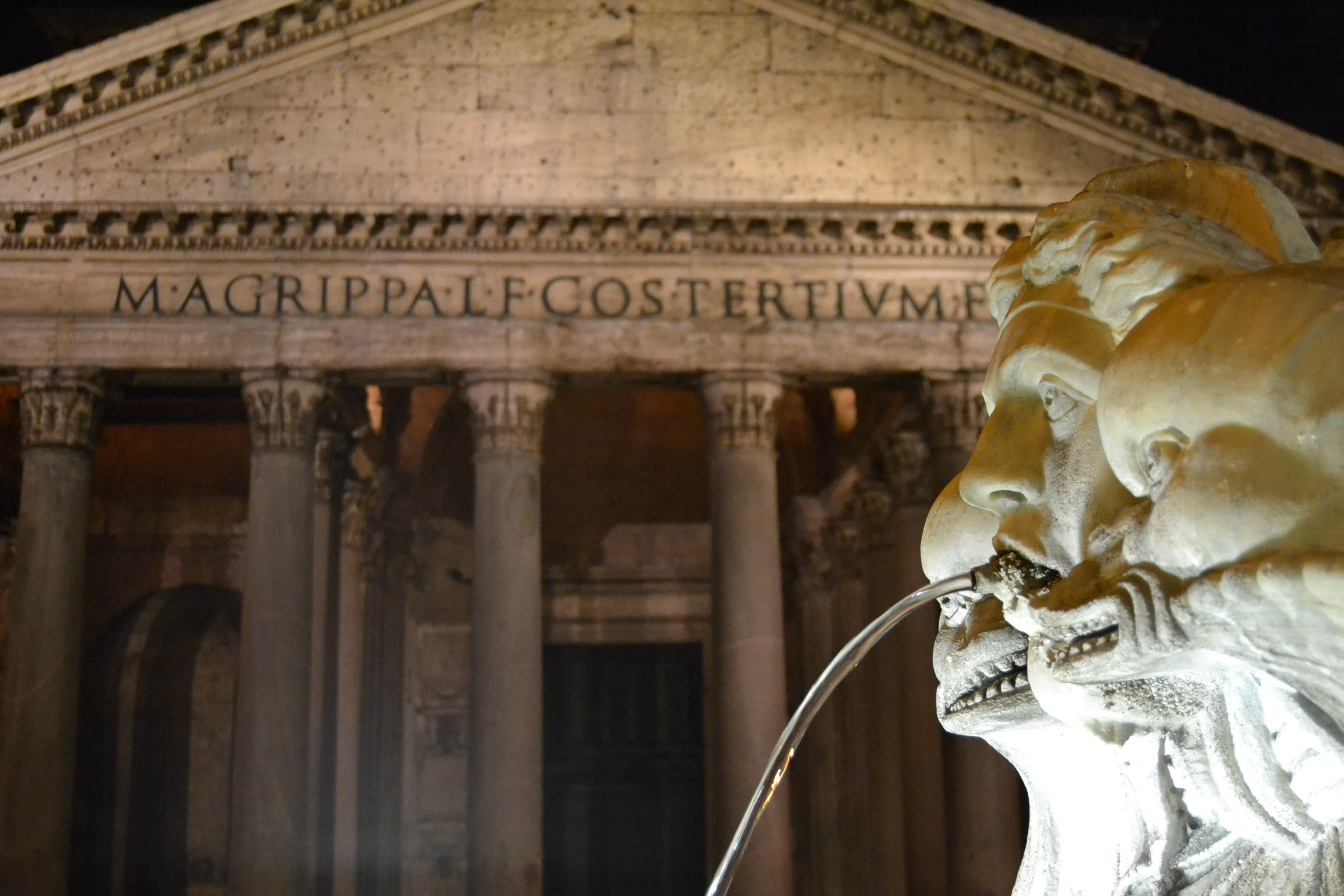 Particolare della fontana del Della Porta sotto obelisco Macuteo e Pantheon